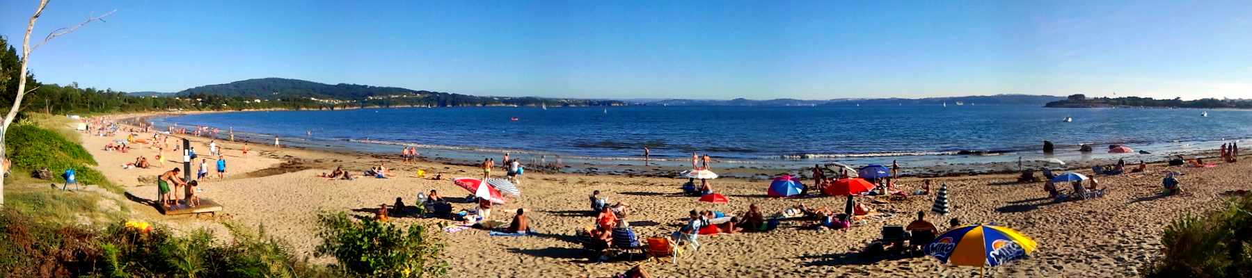 Playa de Seselle, Ares